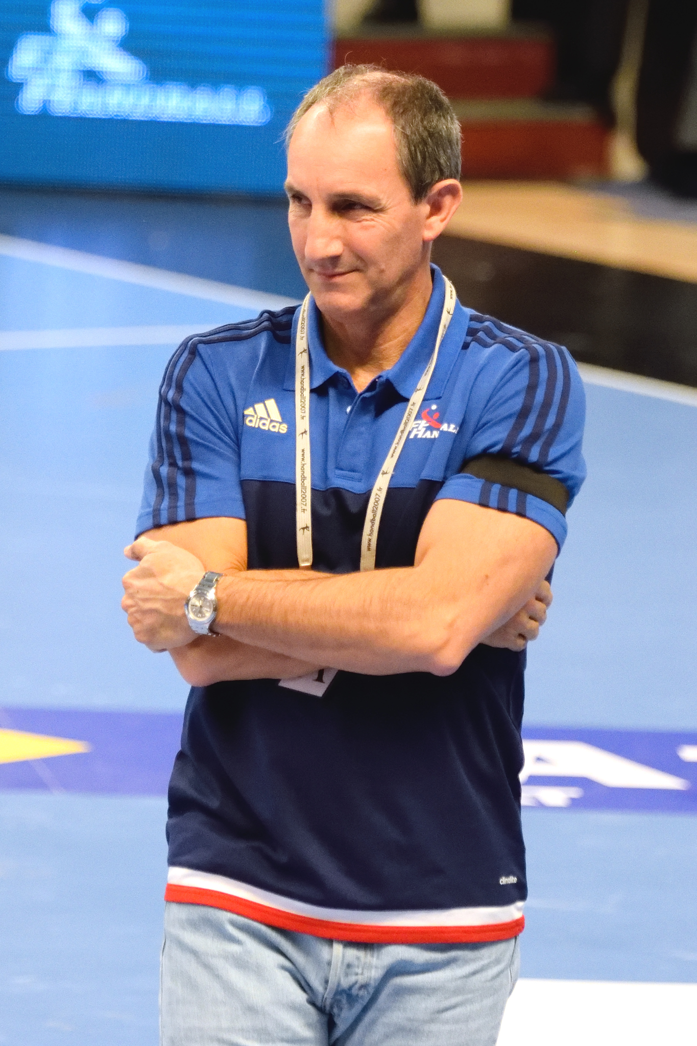 Alain Portes lors du match France / République Tchèque pour le compte du TIPIFF le 29 novembre 2015.